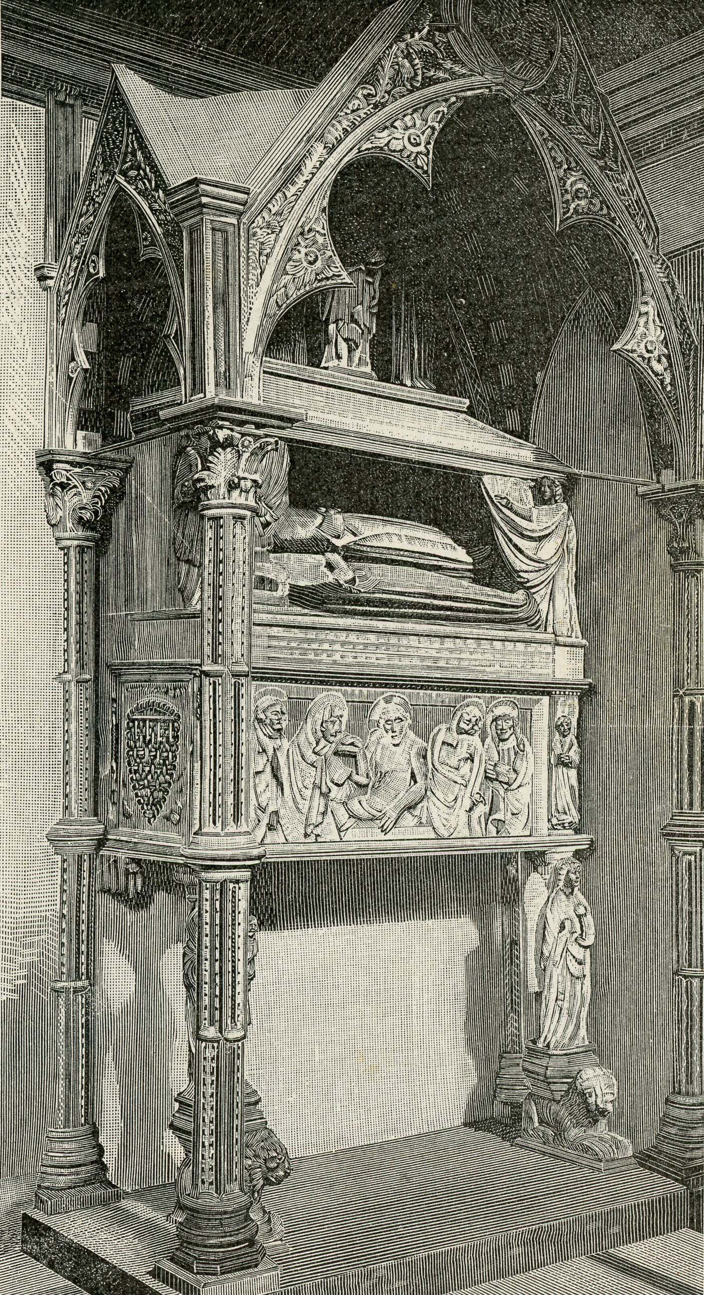 Napoli (chiesa di S. Chiara): monumento ad Agnese e Clemenza D’Angio (xilografia).